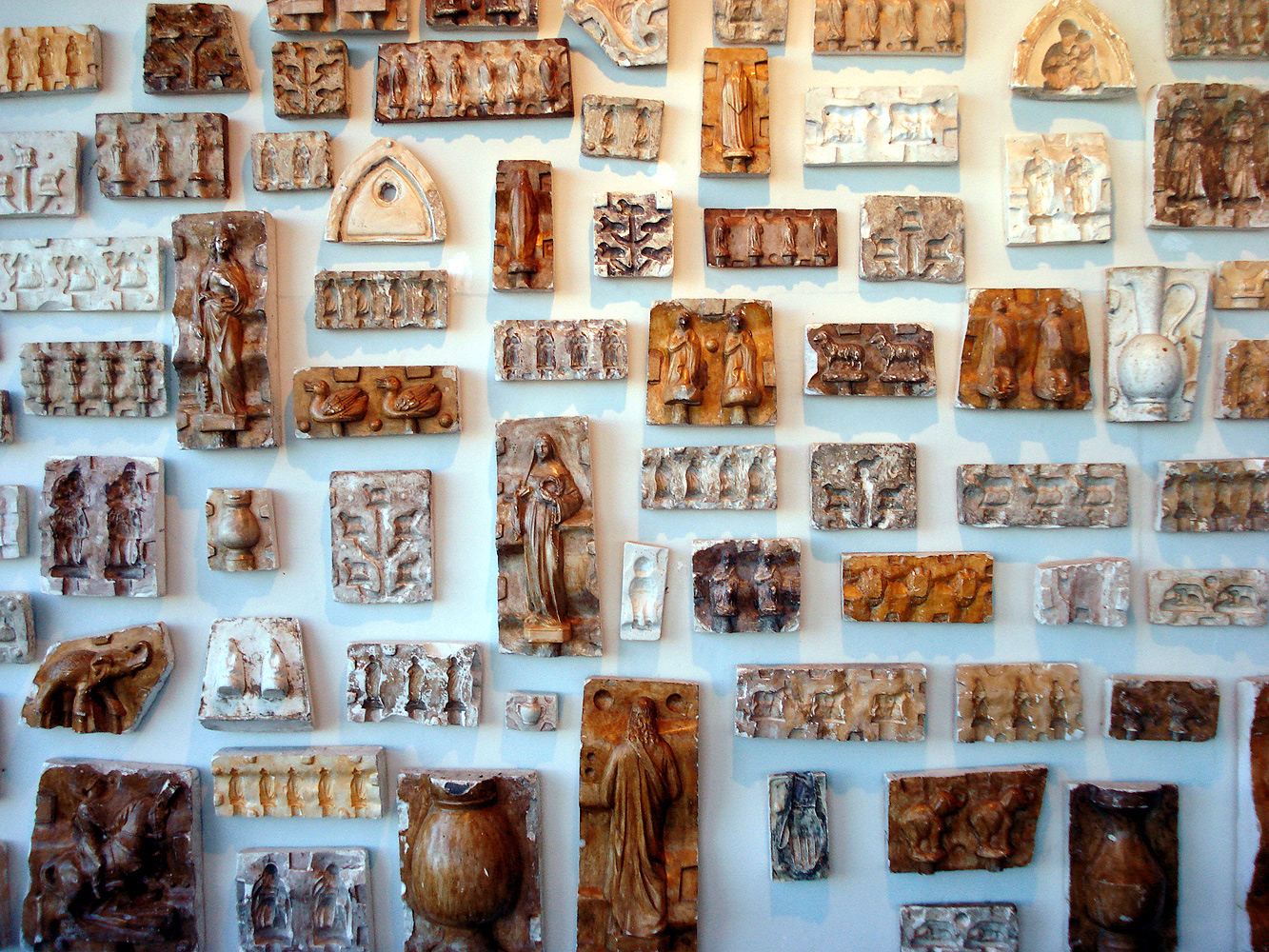 Moldes para estátuas e objetos decorativos, de Michelangelo Zambelli, Memorial Atelier Zambelli, Caxias do Sul, Brasil.